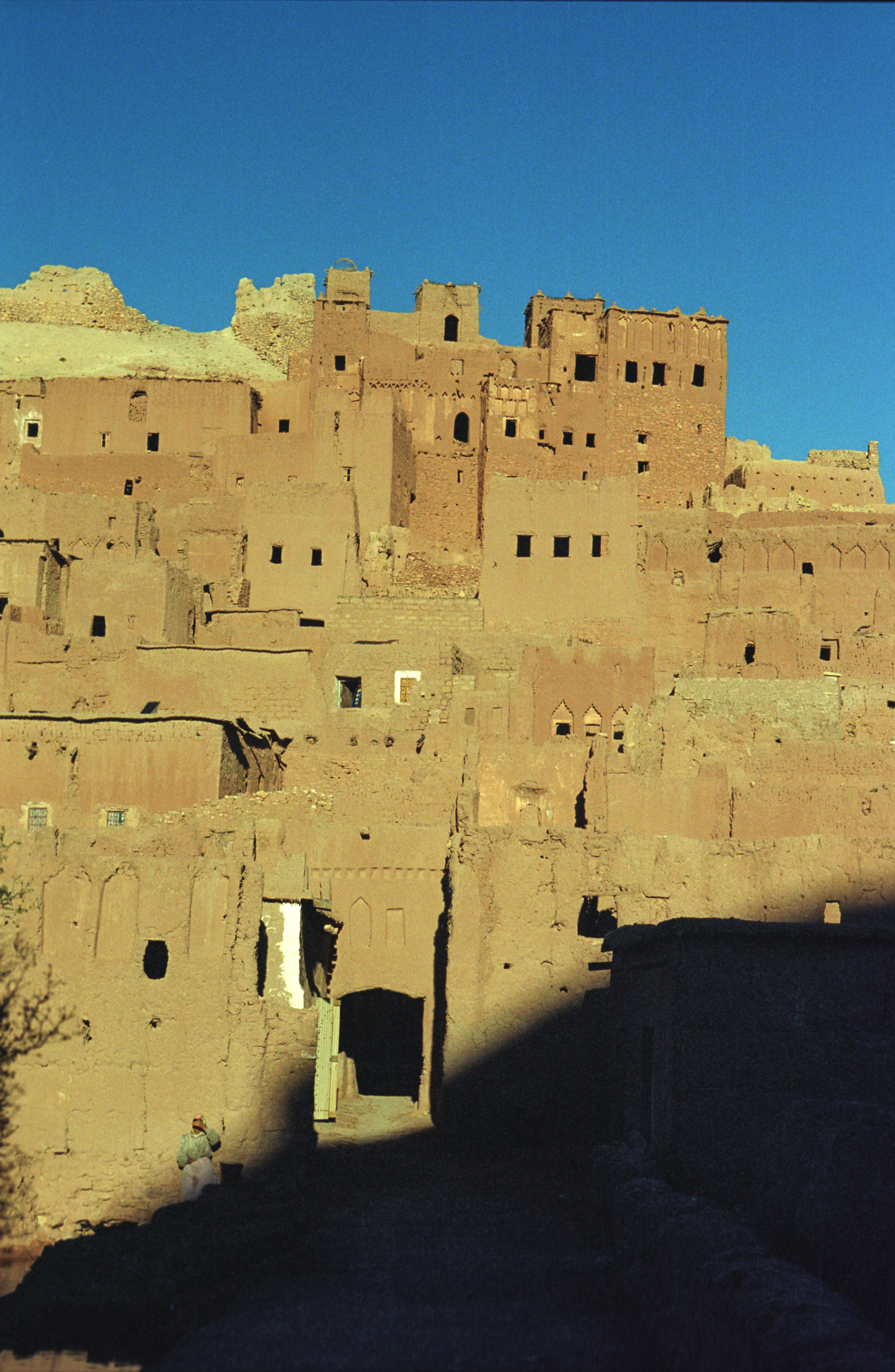 Aït Benhaddou